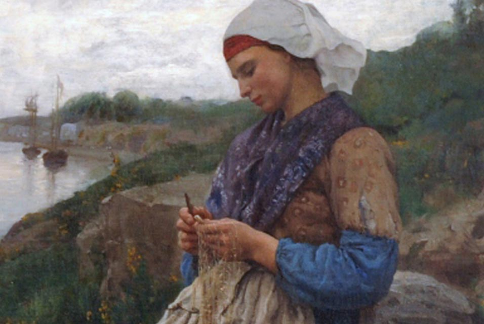 detail